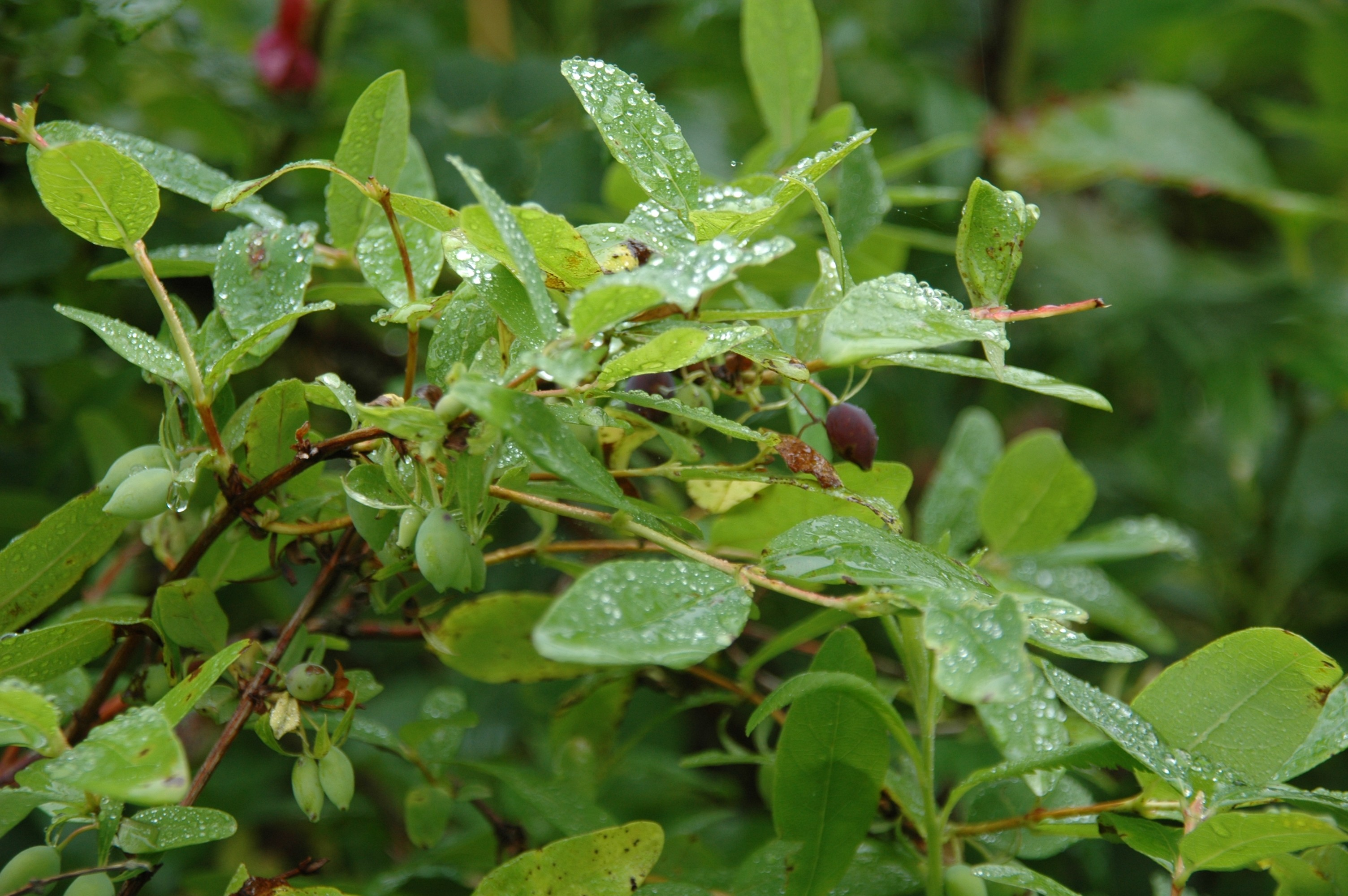 Lonicera caerulea L., Tomakomai, Hokkaido, Japan